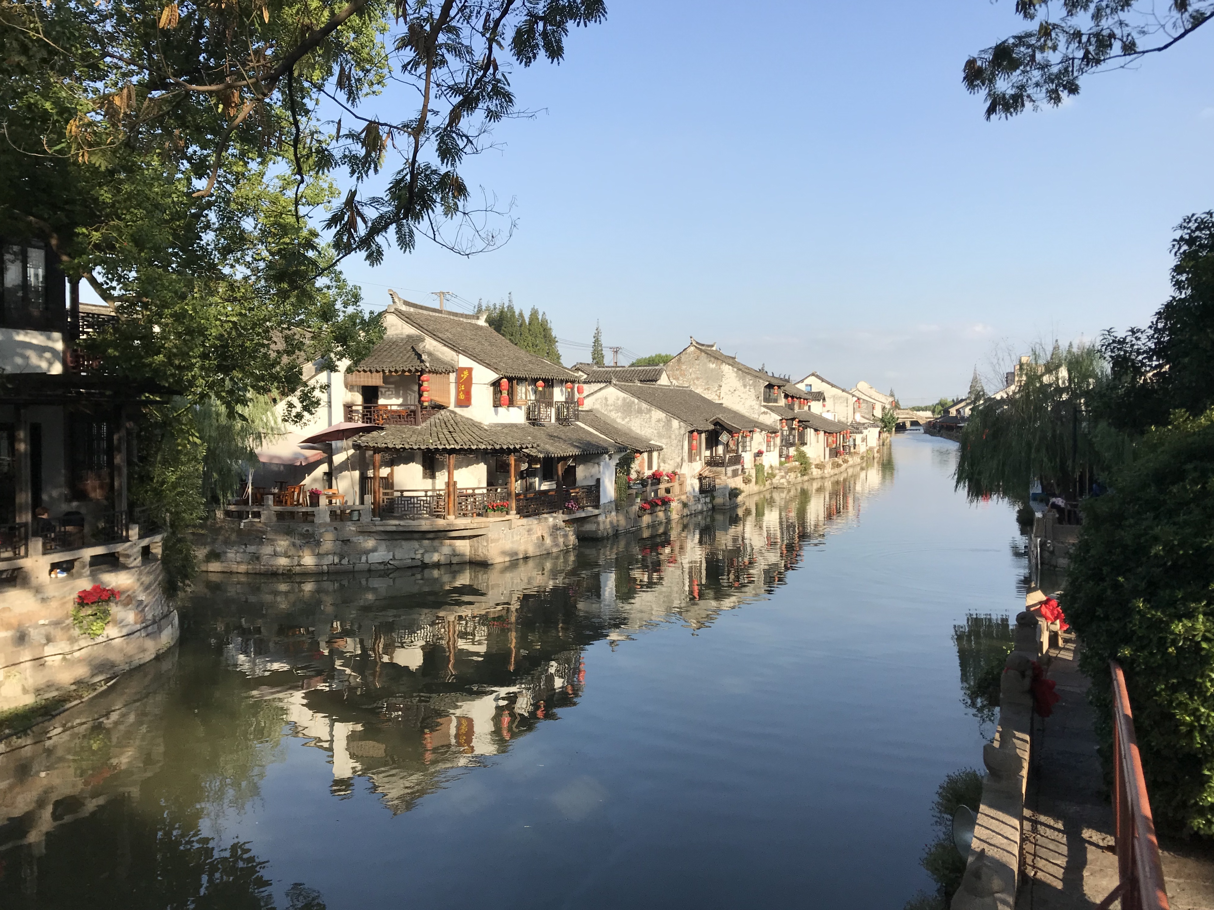 楓涇鎮・清風橋より望む市河